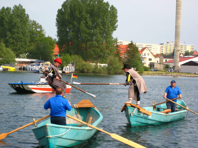 mueritzsail_fischerstechen